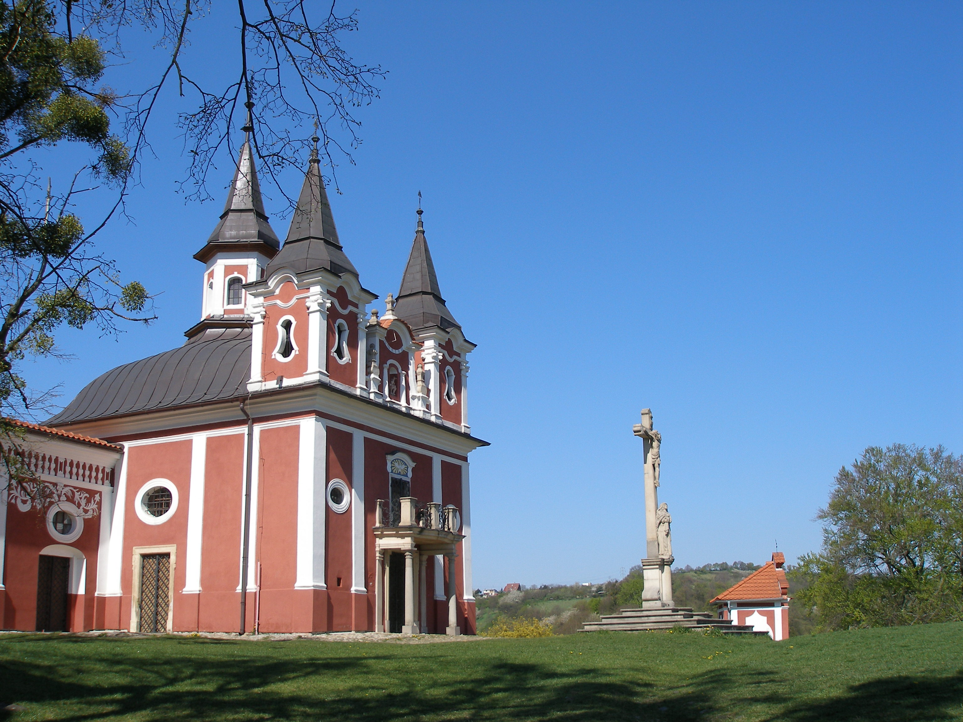 Kostol na Kalvárii v Prešove